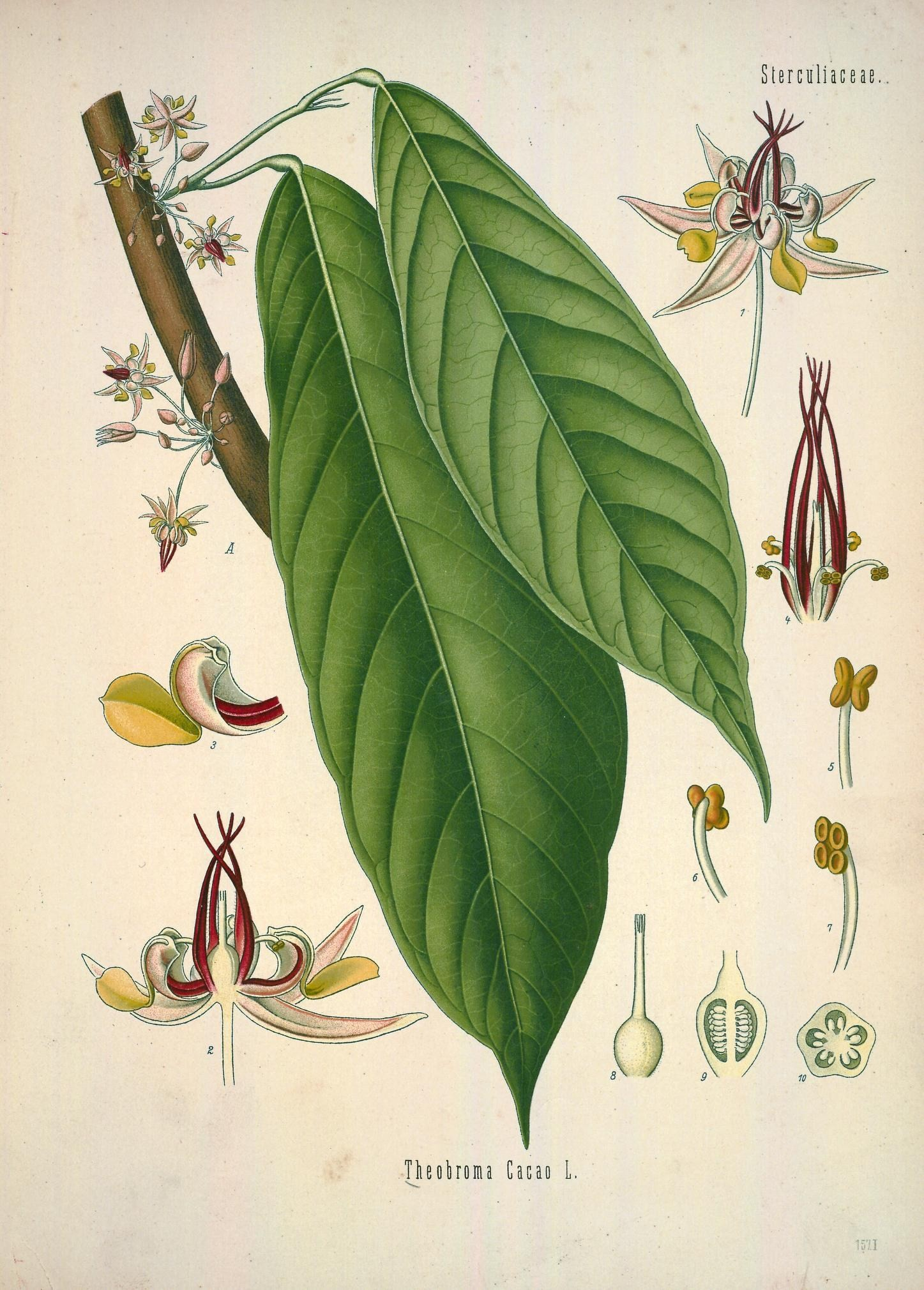 Kakaobaum. A blühender Ast nat. Gr. 1 Blüthe, vergrössert; 2 dieselbe im Längsschnitt, desgl.; 3 Kronenblatt, desgl.; 4 Blüthe ohne Kronenblätter; 5, 6, 7 Staubgefässe, desgl.; 8 Stempel, desgl.; 9, 10 Fruchtknoten im Längs- und Querschnitt, desgl. Köhler's Medizinal-Pflanzen in naturgetreuen Abbildungen mit kurz erläuterndem Texte : Atlas zur Pharmacopoea germanica, austriaca, belgica, danica, helvetica, hungarica, rossica, suecica, Neerlandica, British pharmacopoeia, zum Codex medicamentarius, sowie zur Pharmacopoeia of the United States of America /